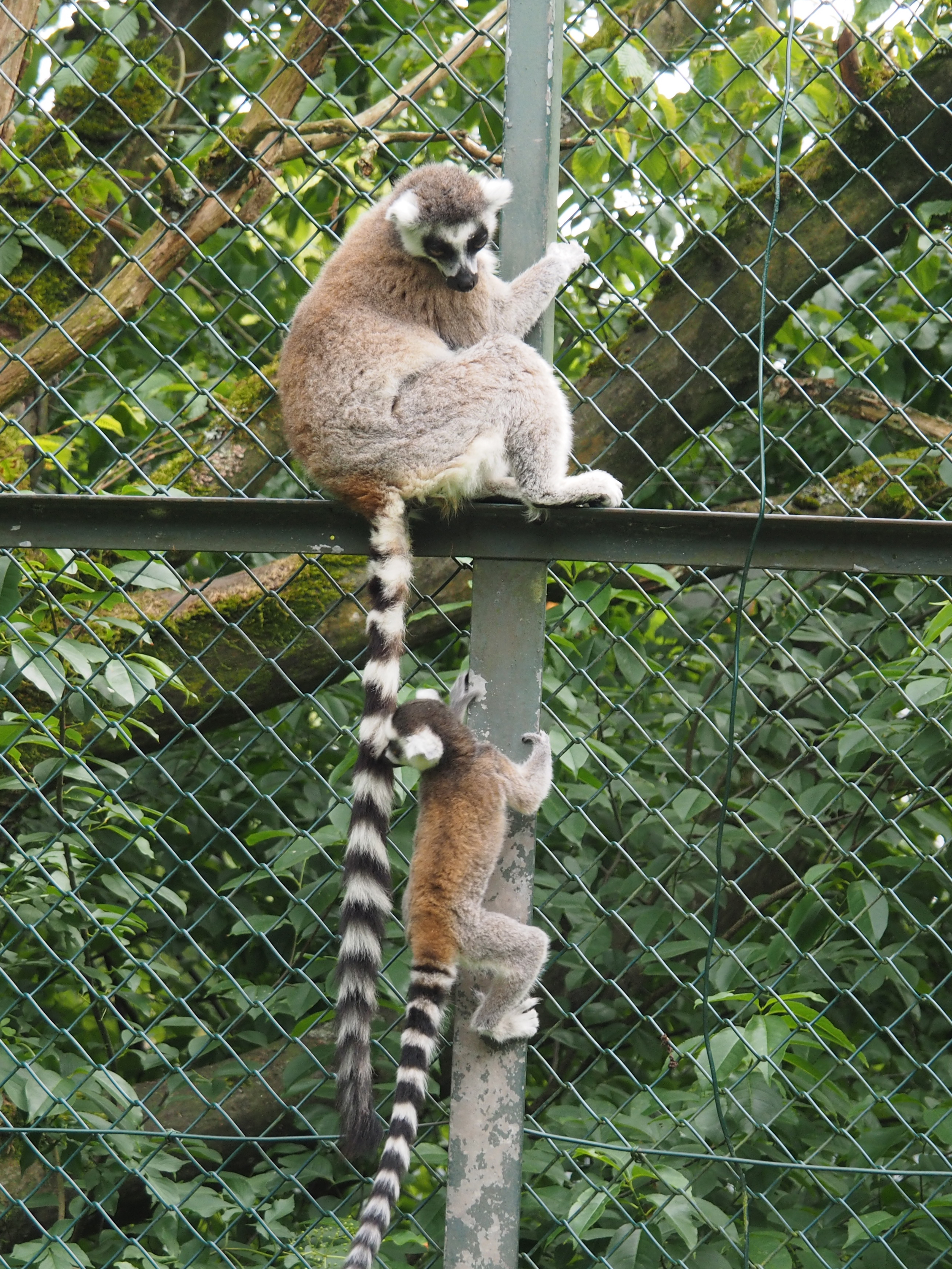 Katta-Junges mit Mutter (Lemur catta) im Serengeti-Park Hodenhagen, Niedersachsen, Germany